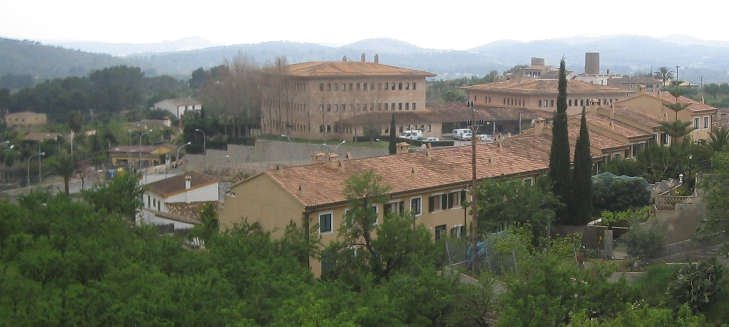 A spanish village called Calvià in Mallorca.